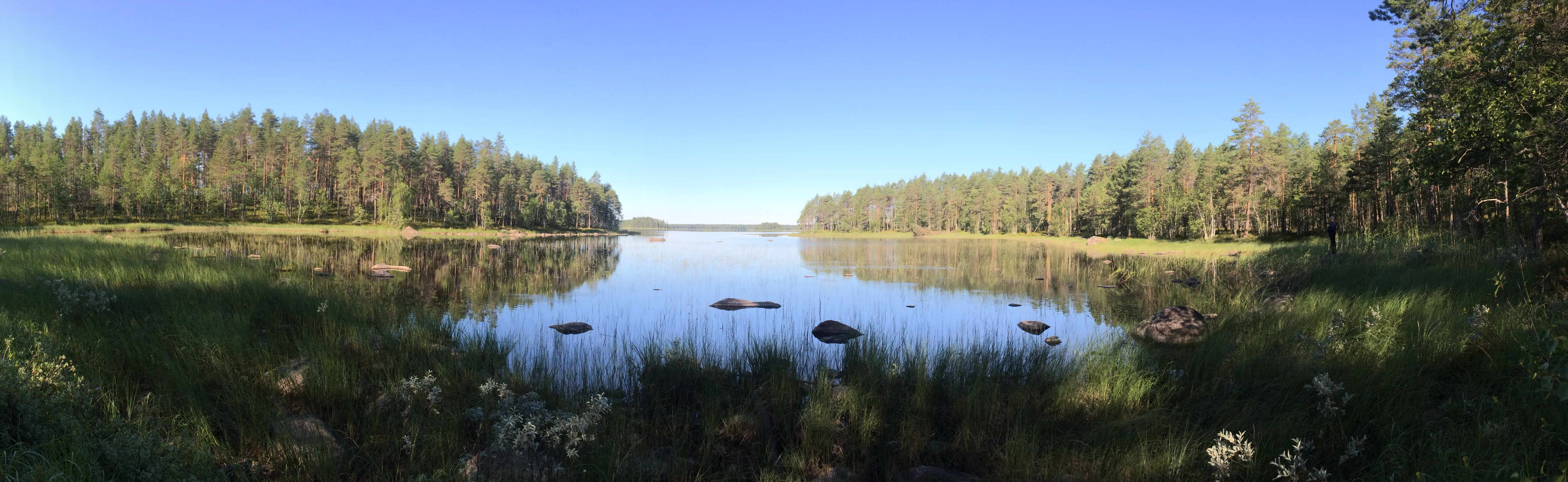 Кинаспуоли